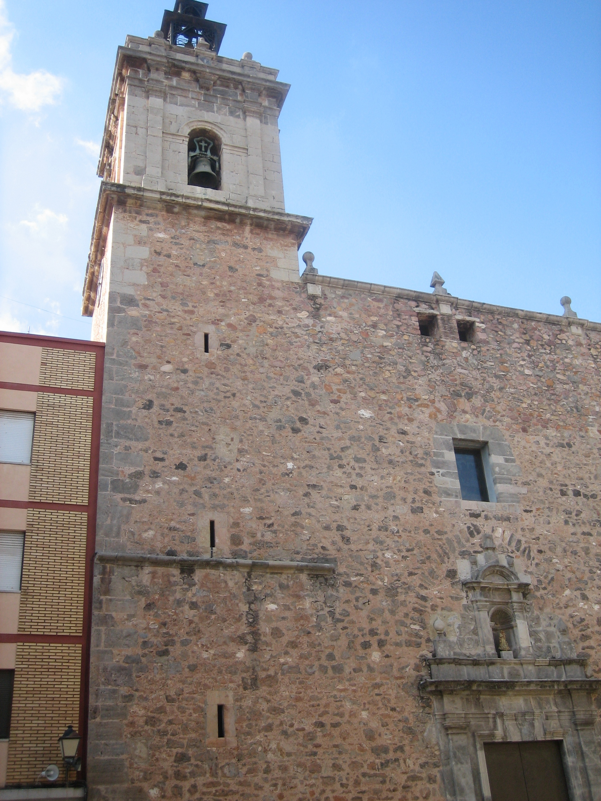 Campanar de l'església de la Mare de Déu dels Àngels de Betxí (Plana Baixa)